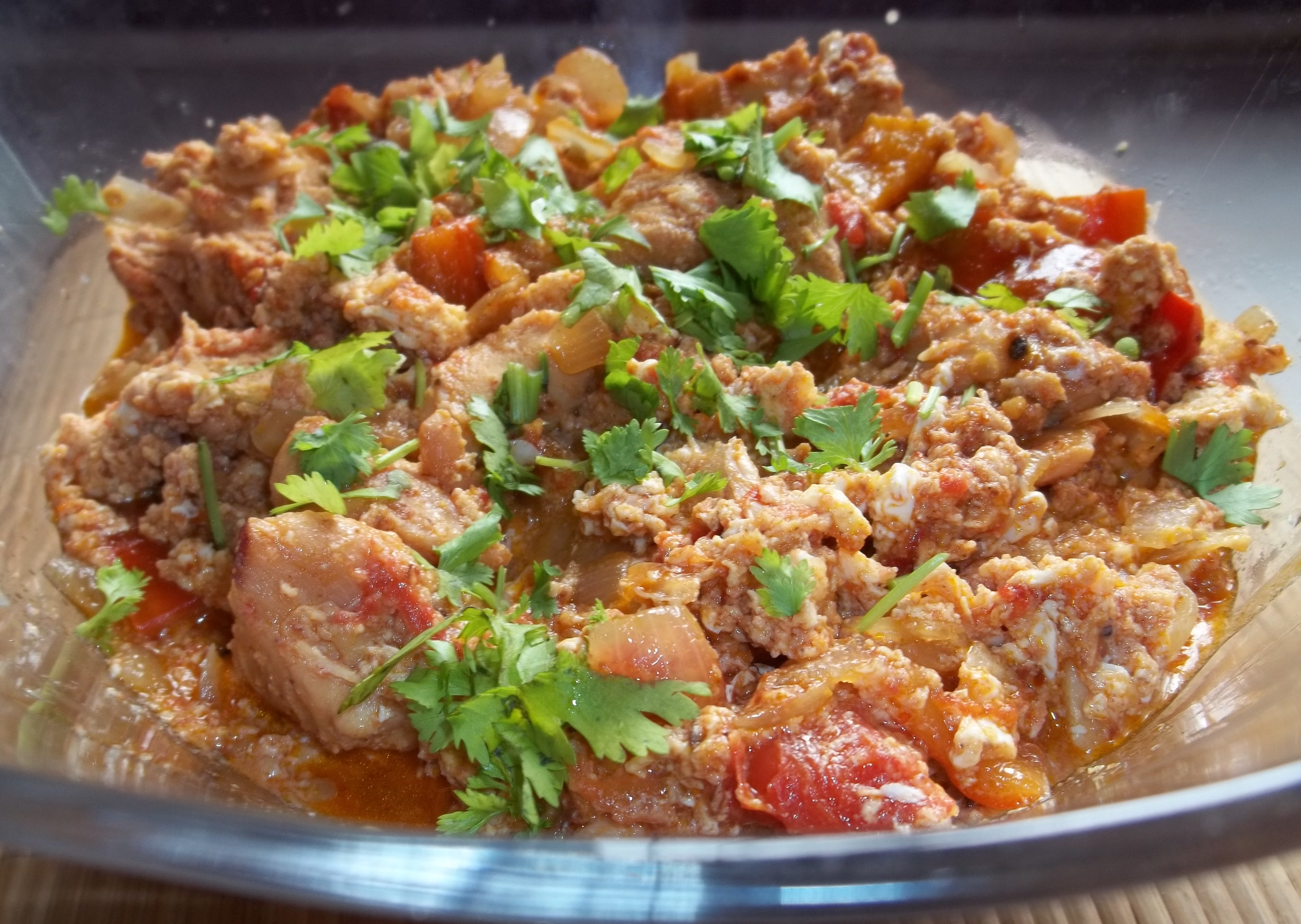 Чахохбили